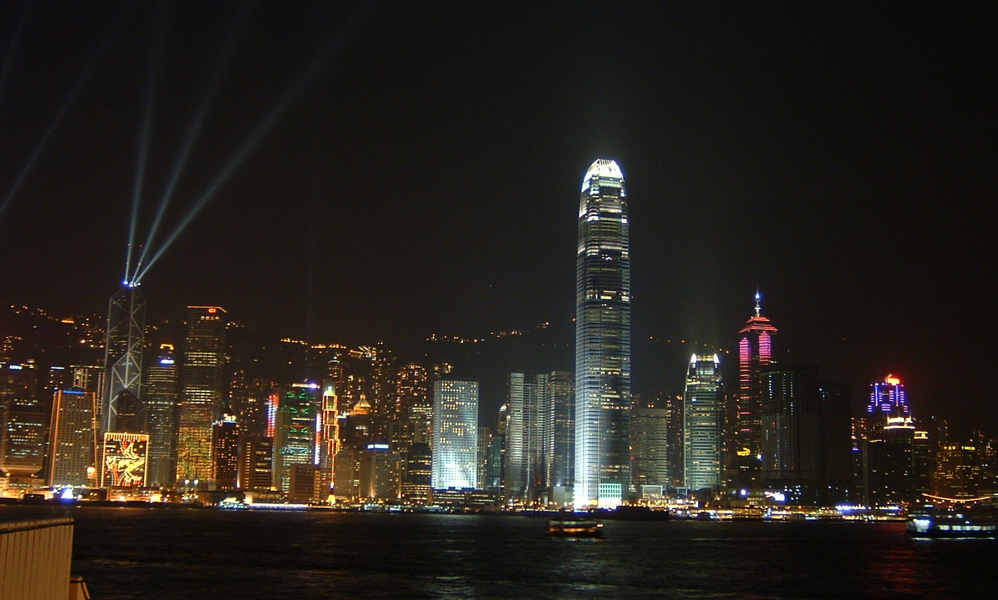 Hongkong - Blick über den Victoria Harbour geschossen im Jänner 2004 und unter die GNU-FDL gestellt von Herr Klugbeisser